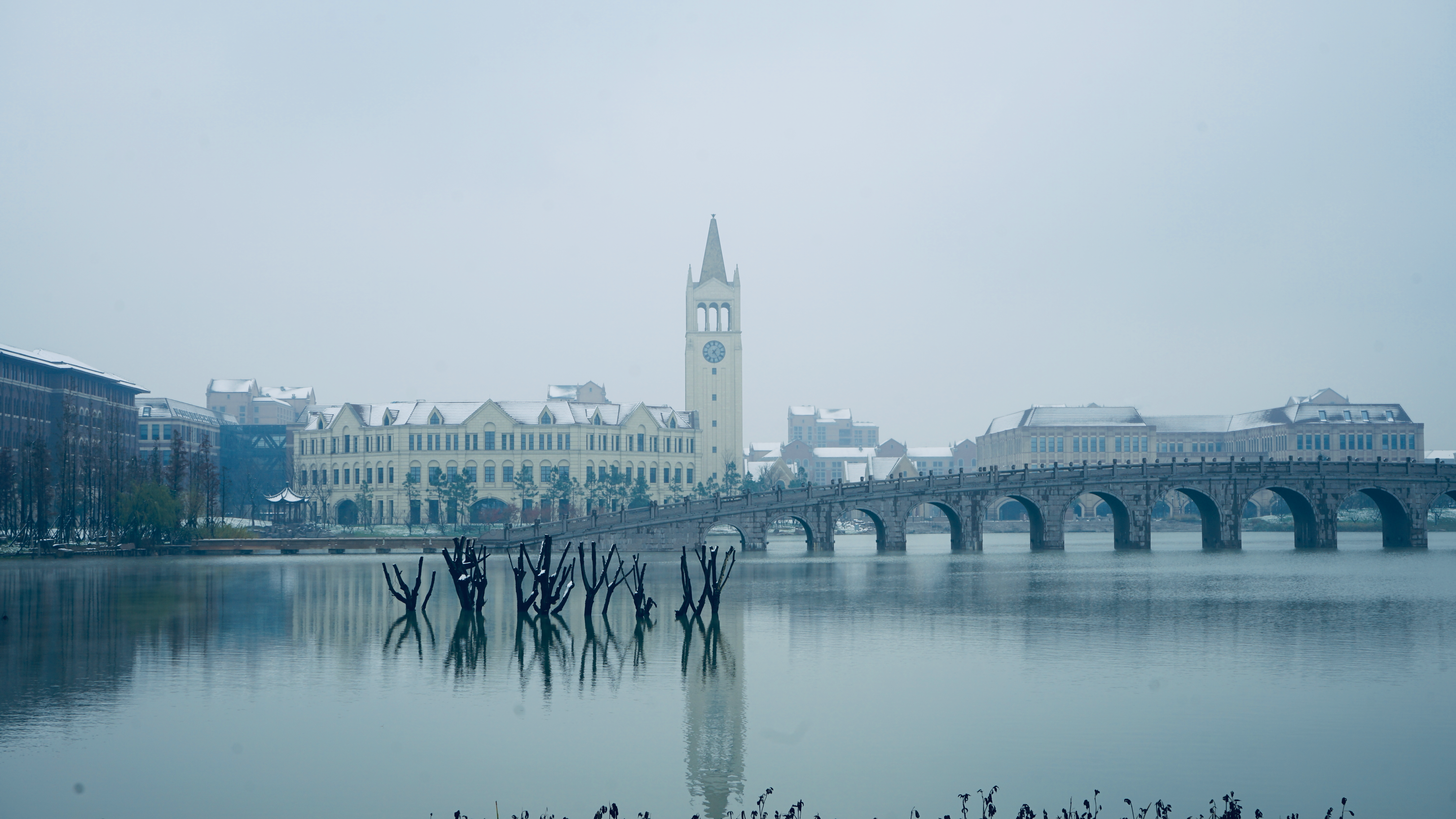 中文（中国大陆）: 浙江大学国际校区雪后